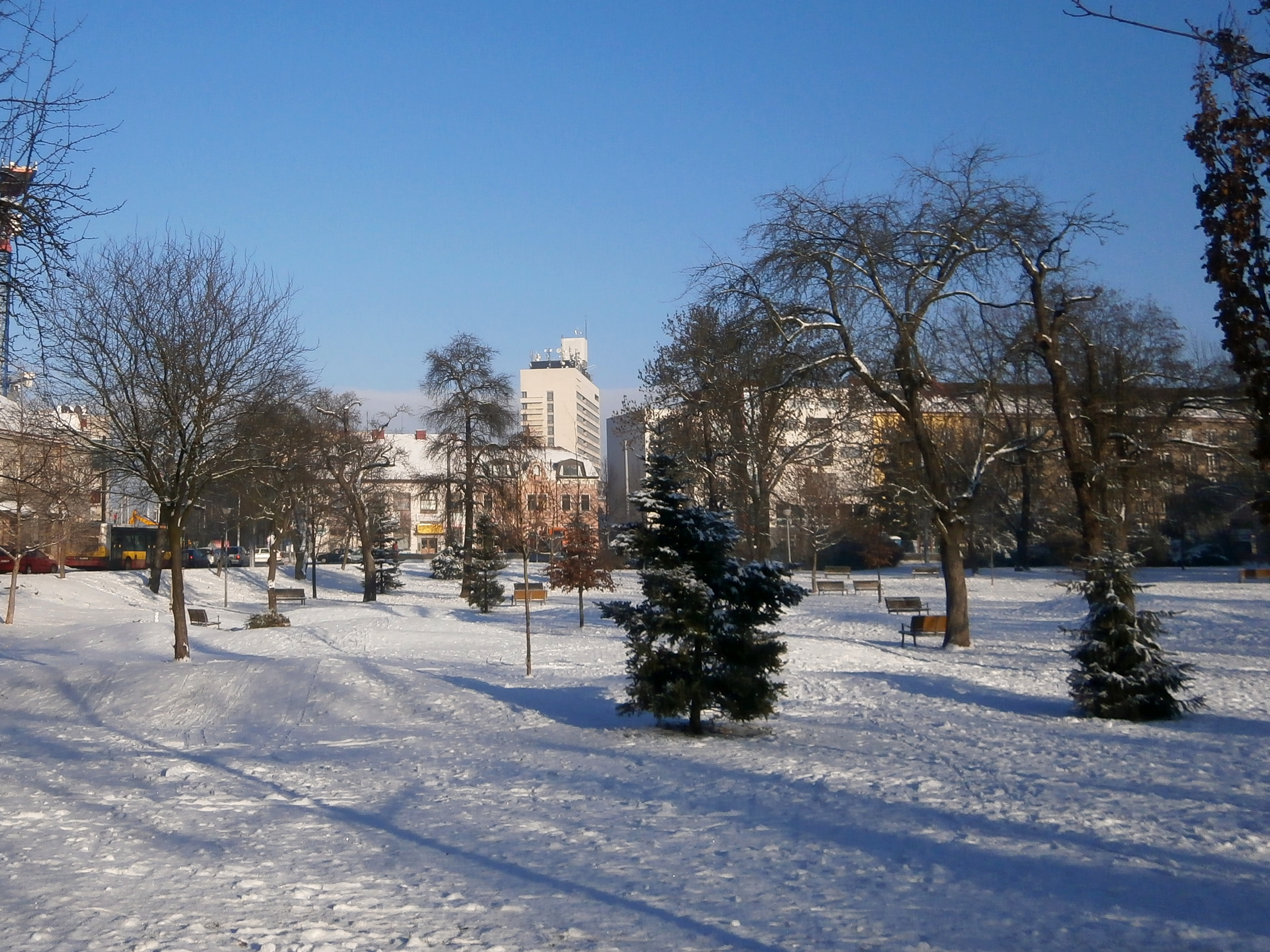 Sukovy sady, původně Fialovy sady (podle obecního starosty, zakladatele okrašlovacího spolku a iniciátora vzniku parku)